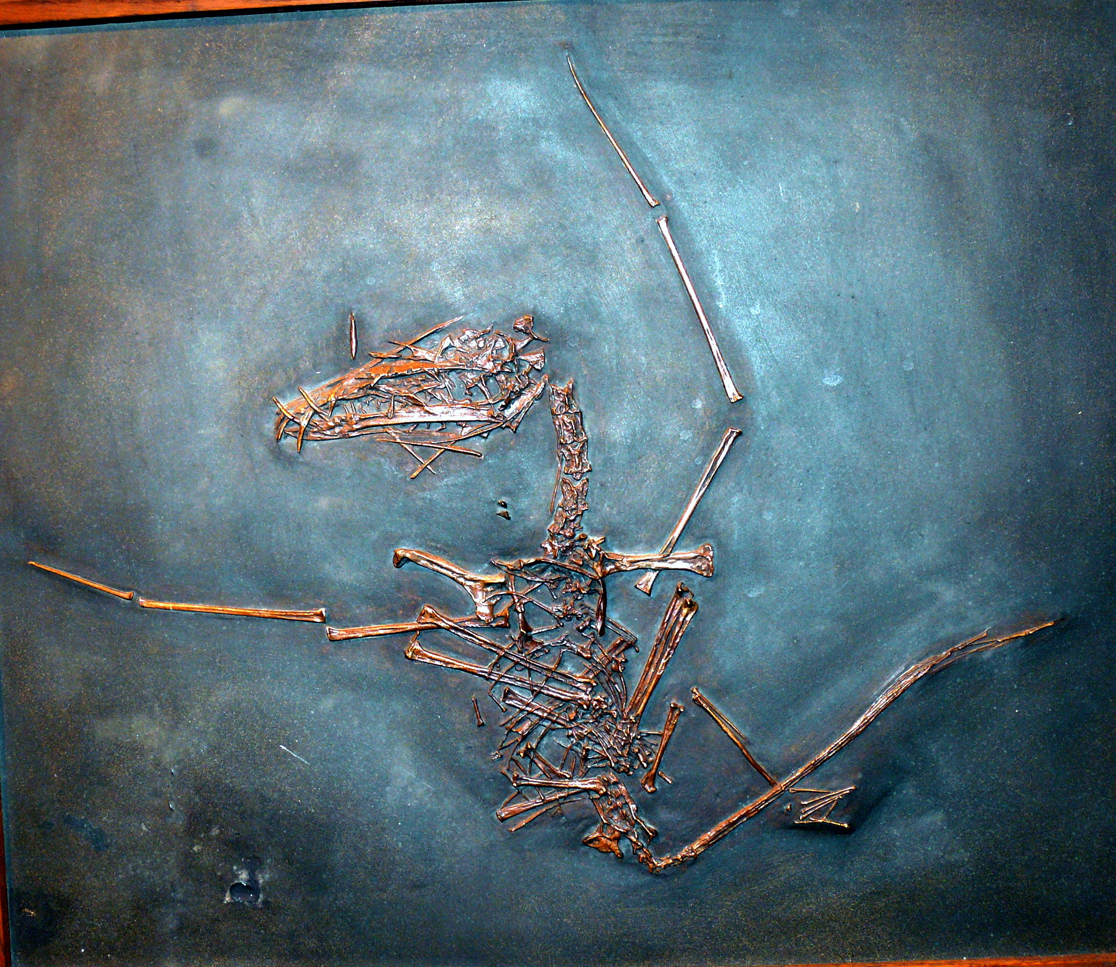 Dorygnathus banthensis, unterer oder schwarzer Jura, etwa 188 Millionen Jahre alt, Holzmaden, Württemberg